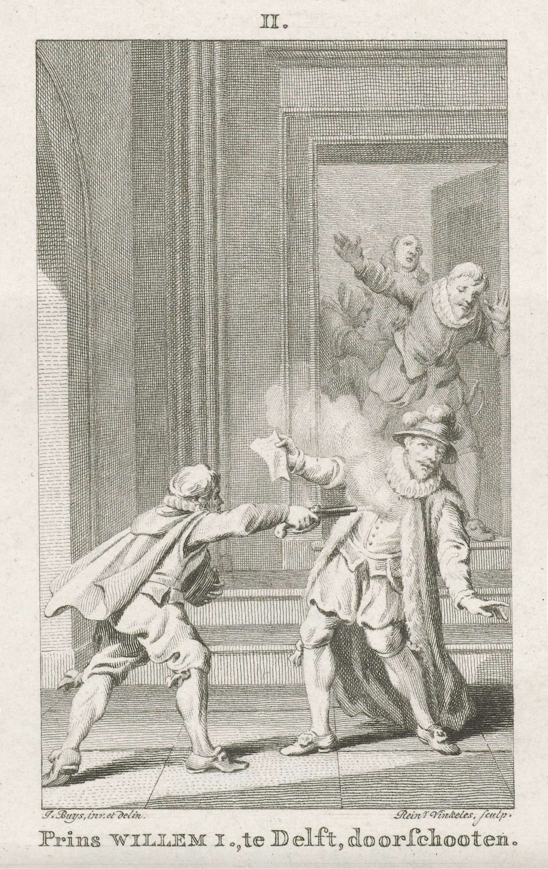 Gravure de Reinier Vinkeles datant de 1782 - 1784 Le prince d'Orange est assassiné le 10 juillet 1584 par Balthasar Gerards au Prinsenhof de Delft. Guillaume d'Orange est abattu dans un couloir.